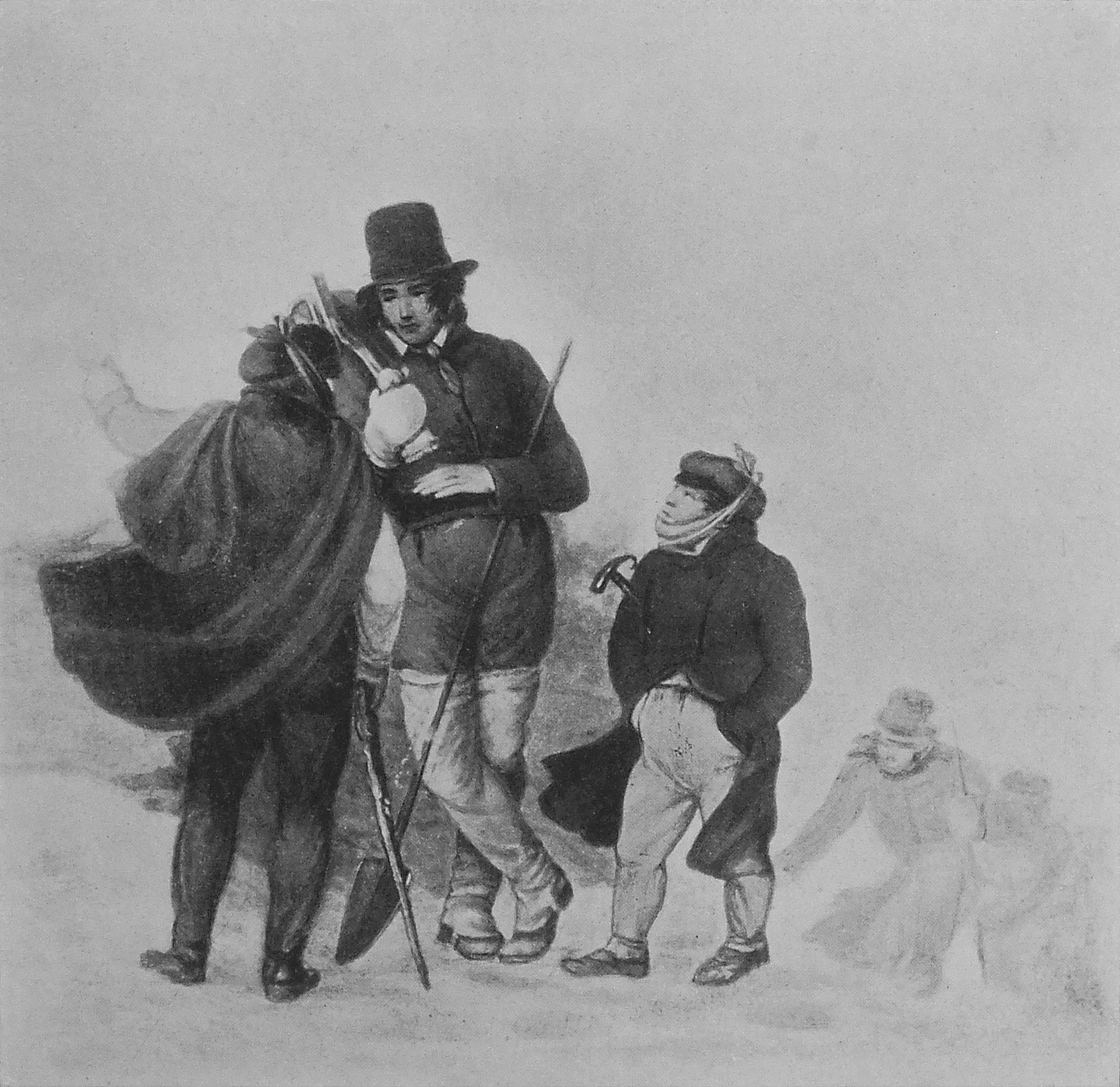 Übergang über den Sankt Bernhard im Schneetreiben (Öl auf Leinen 240 × 240 mm, 1824; in der Mitte ist G. J. Guttekunst zu sehen)